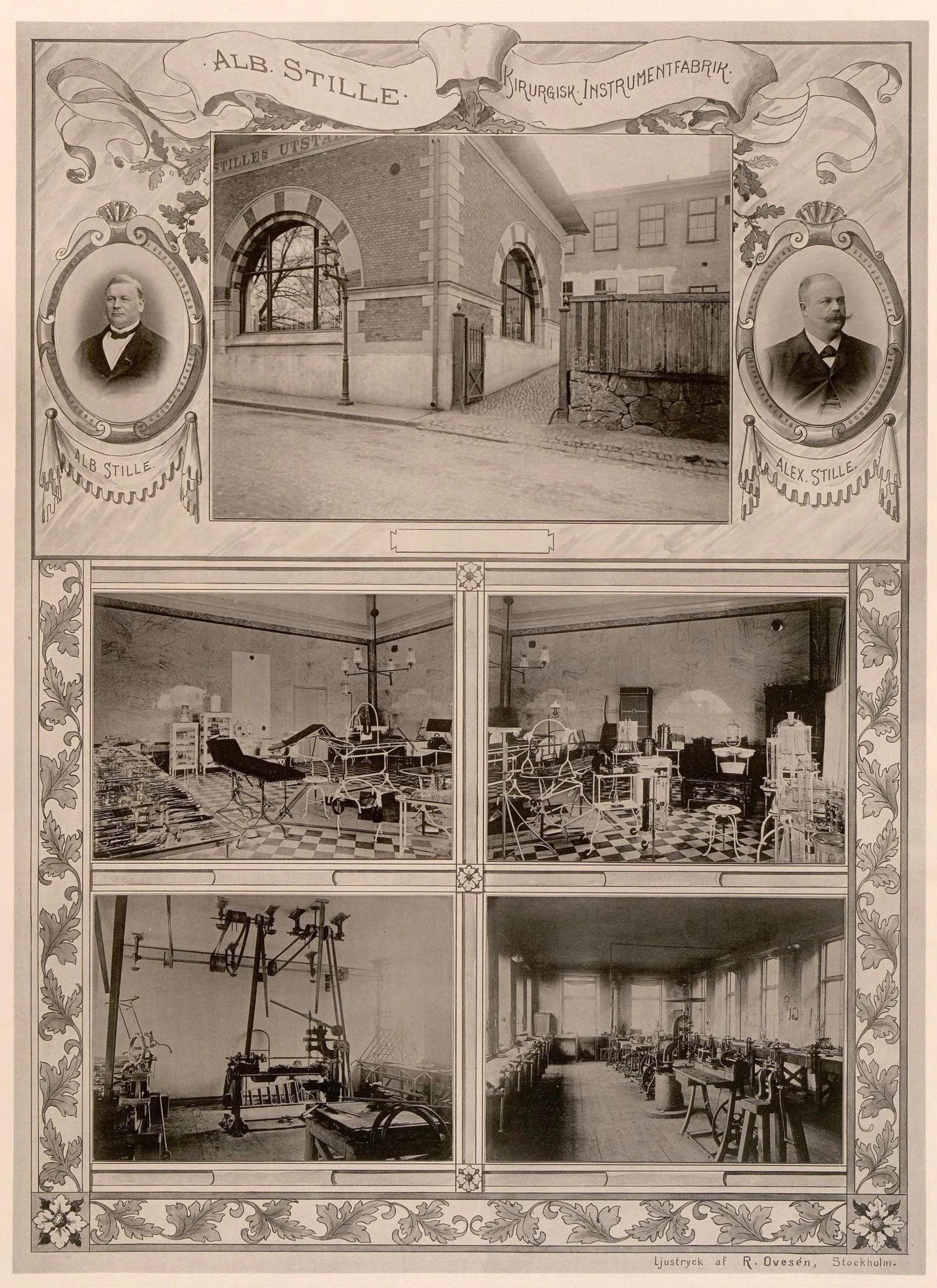 Albert Stilles kirurgiska instrumentfabrik